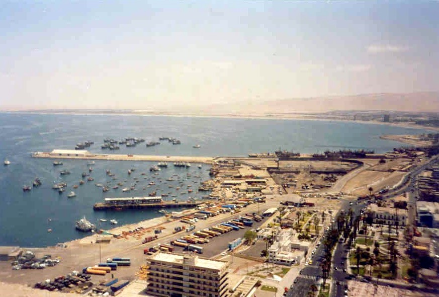 Muelle Peruano de Arica